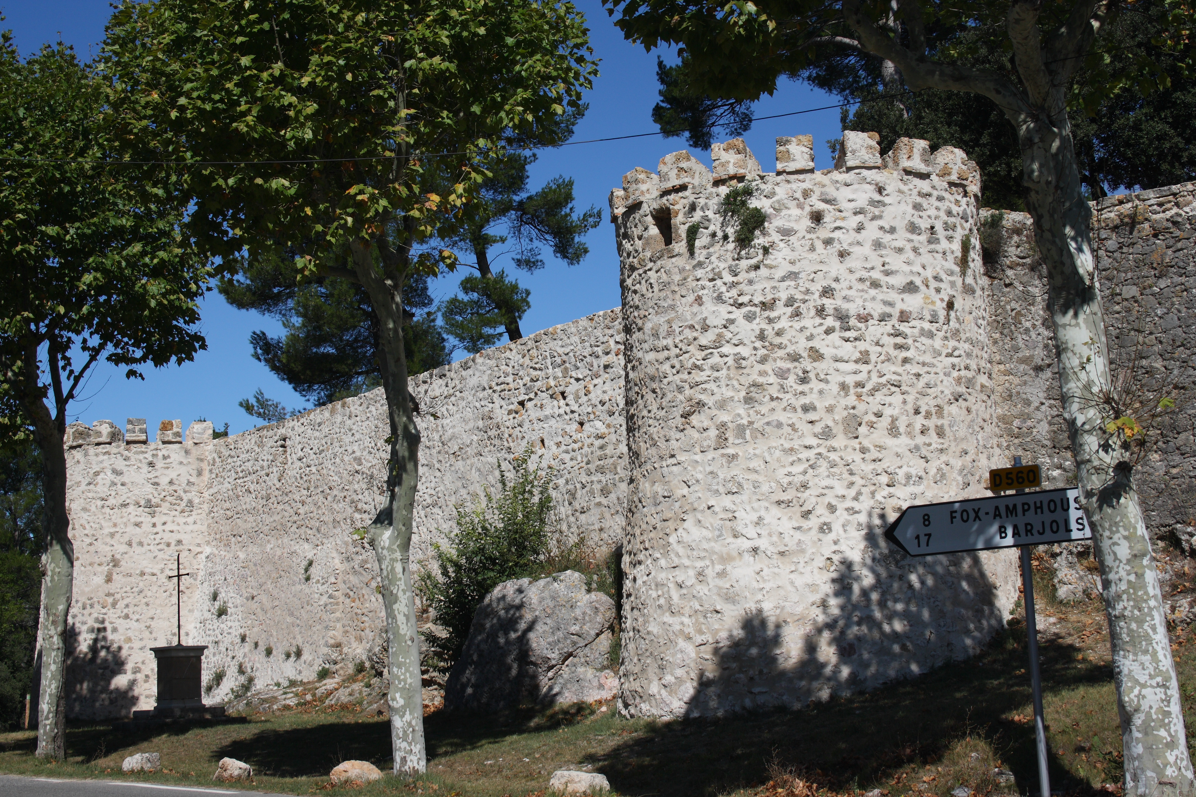 Ortsbefestigung in Sillans-la-Cascade